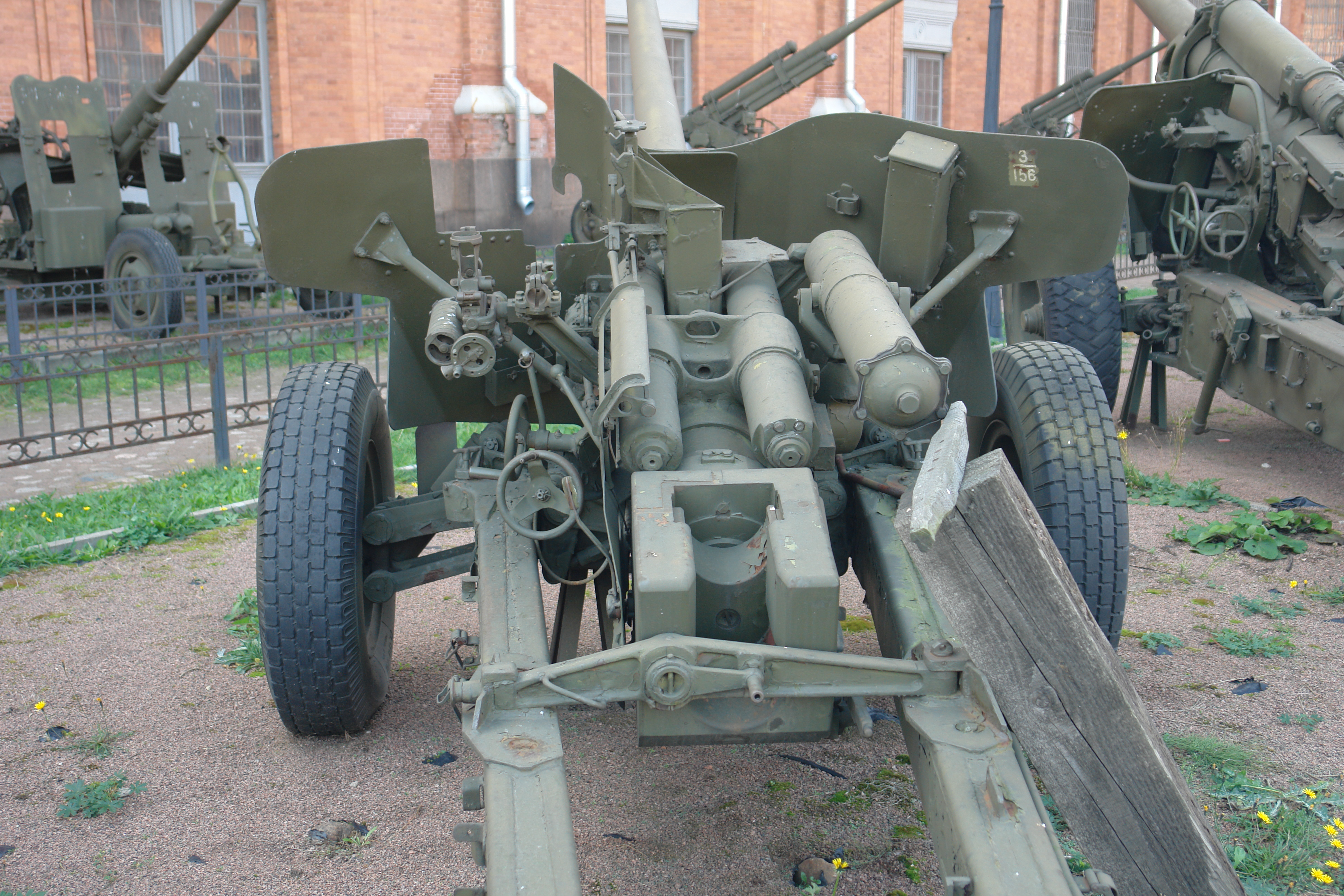 100-мм ПРОТИВОТАНКОВАЯ ПУШКА МТ-12(2А29) ПРИНЯТА НА ВООРУЖЕНИЕ В 1968 г. ГЛАВНЫЙ КОНСТРУКТОР Г.И.ЛУКЬЯНЧЕНКО. ДАЛЬНОСТЬ, М: СТРЕЛЬБЫ-8200, ПРЯМОГО ВЫСТРЕЛА - 1880. СКОРОСТРЕЛЬНОСТЬ - ДО 14 ВЫСТР/МИН МАССА ОРУДИЯ-3100. РАСЧЕТ 7 человек Военно-исторический музей артиллерии, инженерных войск и войск связи, Санкт-Петербург.